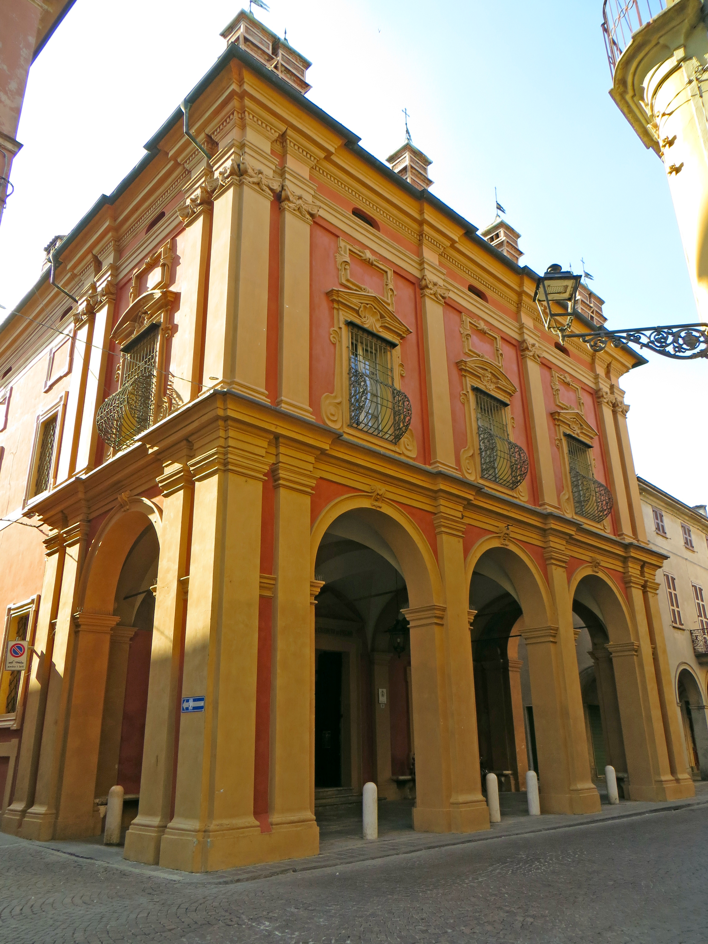 Palazzo del Monte di Pietà (Busseto) - facciata